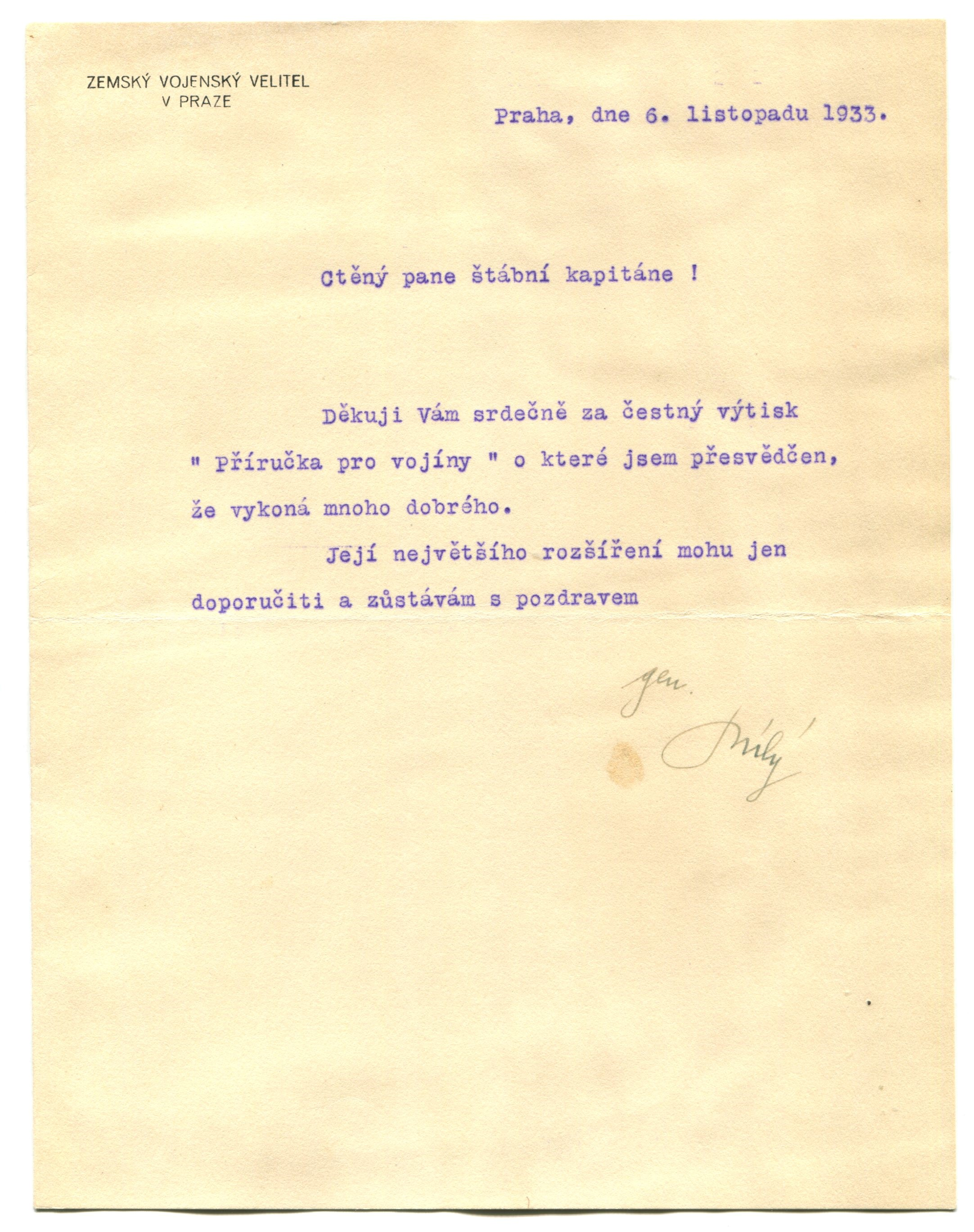 Dopis gen. J. Bilého B. Kohoutovi k vydání Příučky pro vojíny